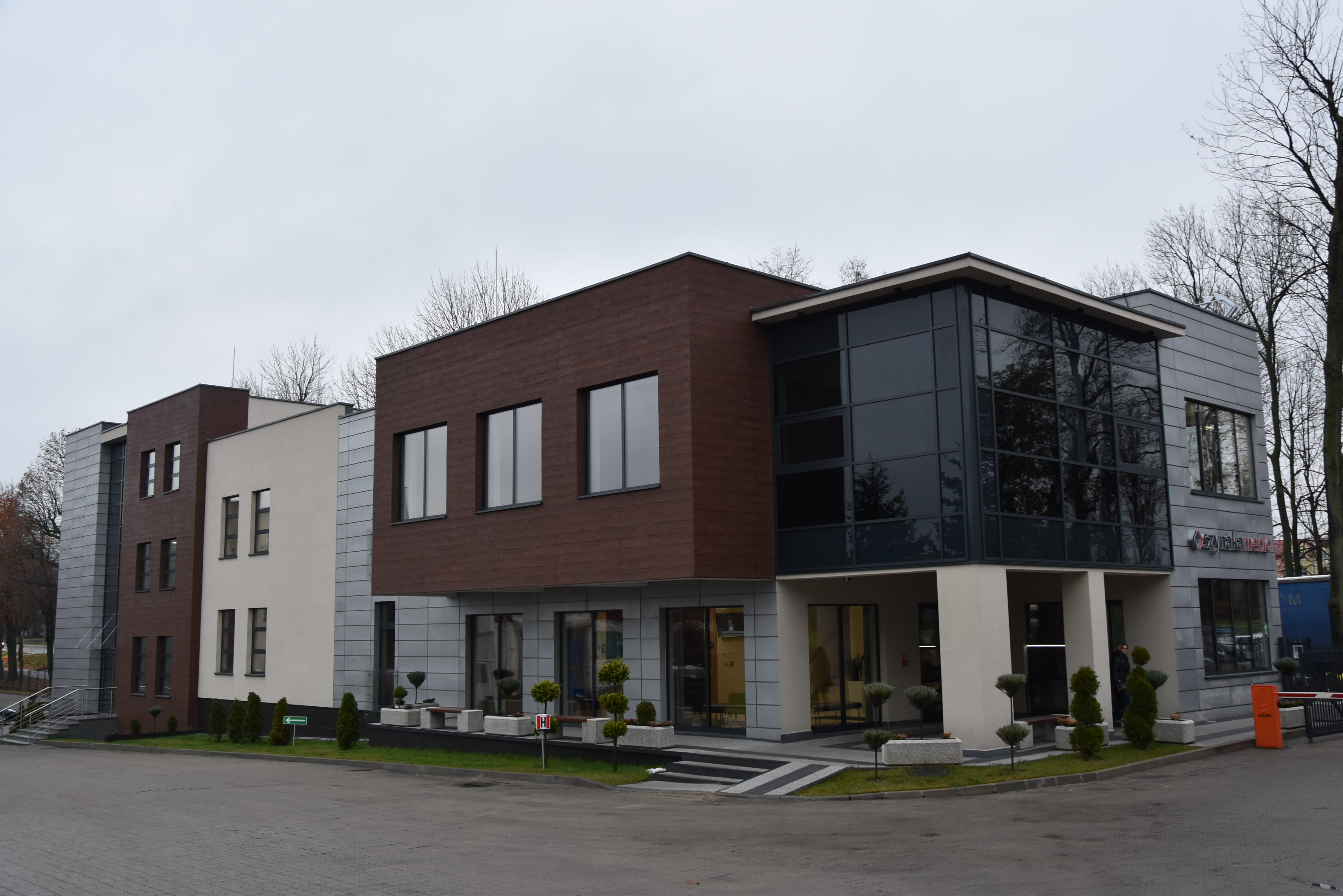 Siedziba główna firmy Szynaka Meble w Lubawie przy ulicy Dworcowej 20.